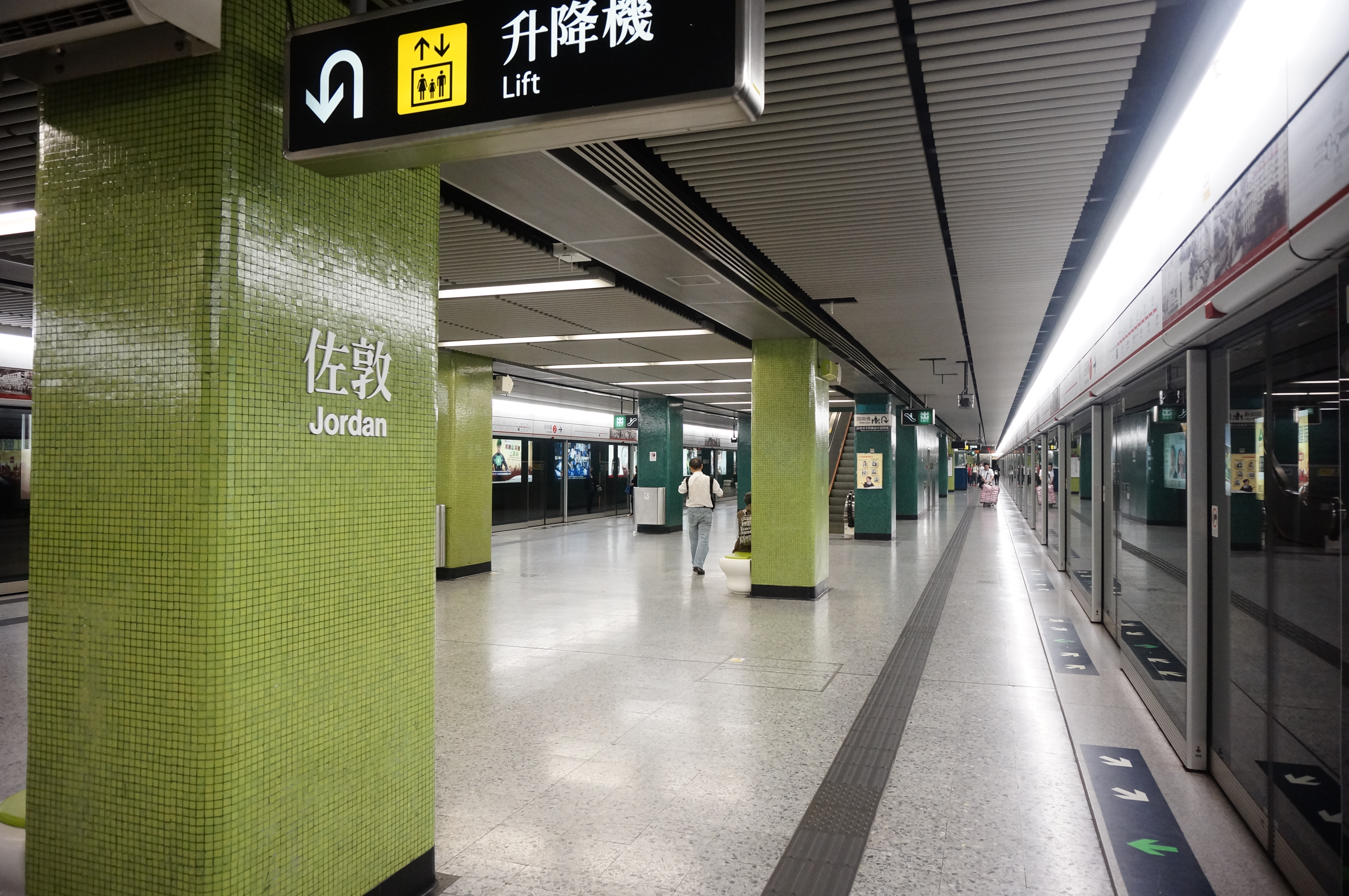 港鐵佐敦站月台